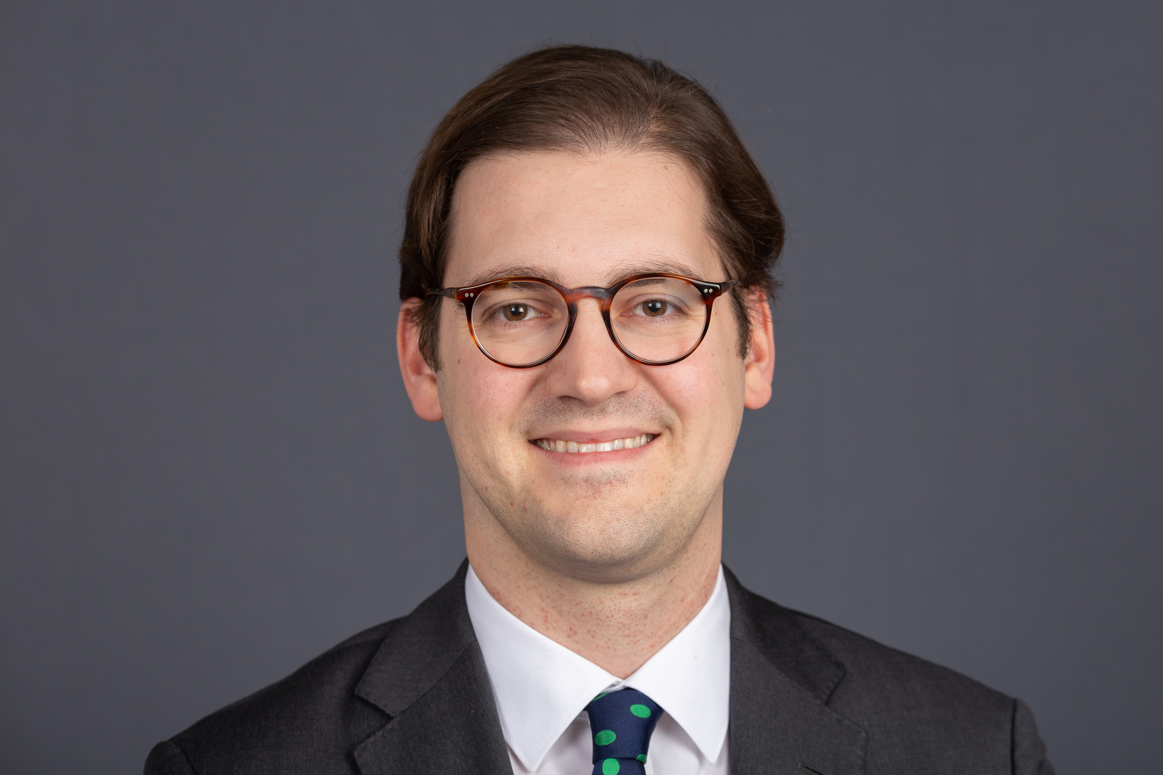 Deutscher Bundestag; Stephan Pilsinger, CSU